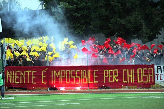 I tifosi giallorossi durante Recanatese-Ancona, Dicembre 2013